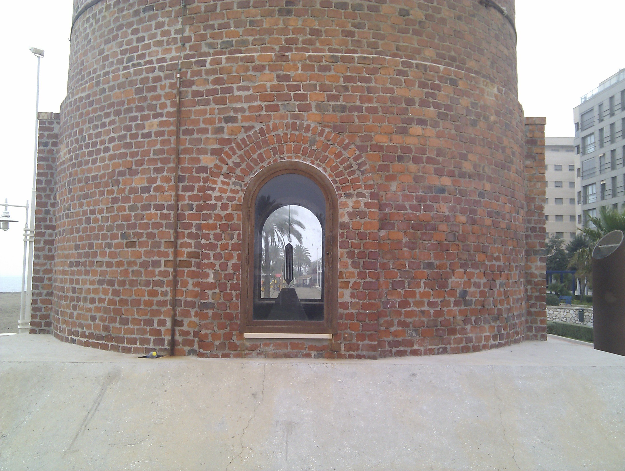 Chimenea con péndulo, Malagá, Calle Pacífico